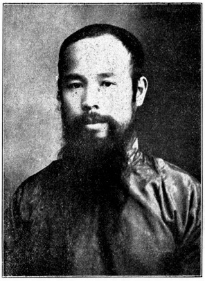 中華民國國會議員